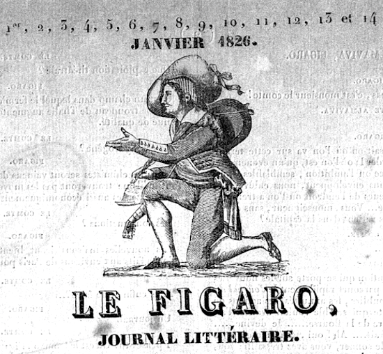 Signet der Zeitung "Le Figaro". Erstausgabe vom 15. Januar 1826. Dargestellt ist Figaro im 1. Akt der Komödie Le barbier de Séville" (1784) von Pierre-Augustin Caron de Beaumarchais.